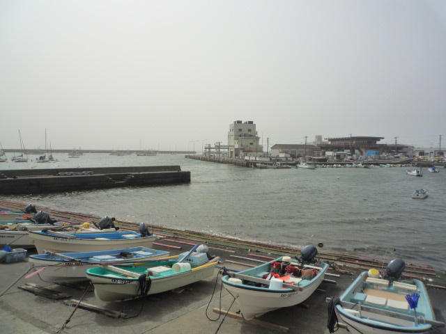 佐島漁港の画像、県道から撮影。